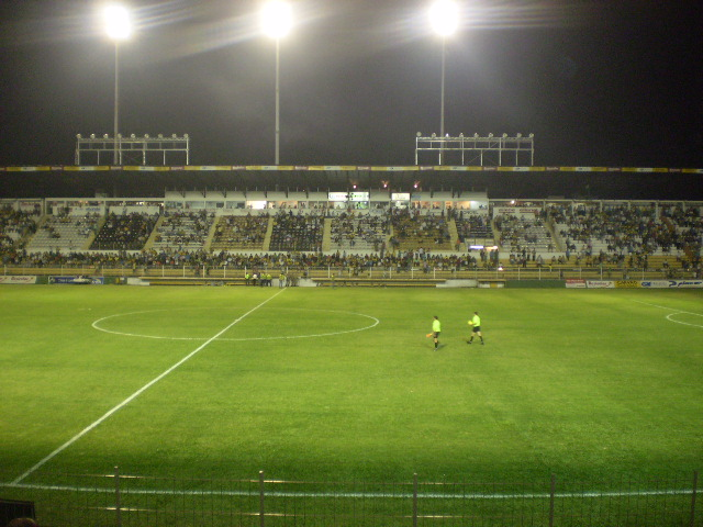 Antigas cabines de imprensa e cadeiras